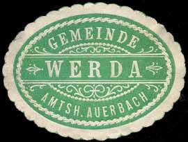 Sealing stamp Title: Gemeinde Werda - Amtshauptmannschaft Auerbach Description: grün, weiß, geprägt Place: Werda size: 3x4 cm